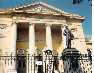 Faculté de Médecine - Bucarest Photographie prise le 23 octobre 1998 par Utilisateur:Brunello